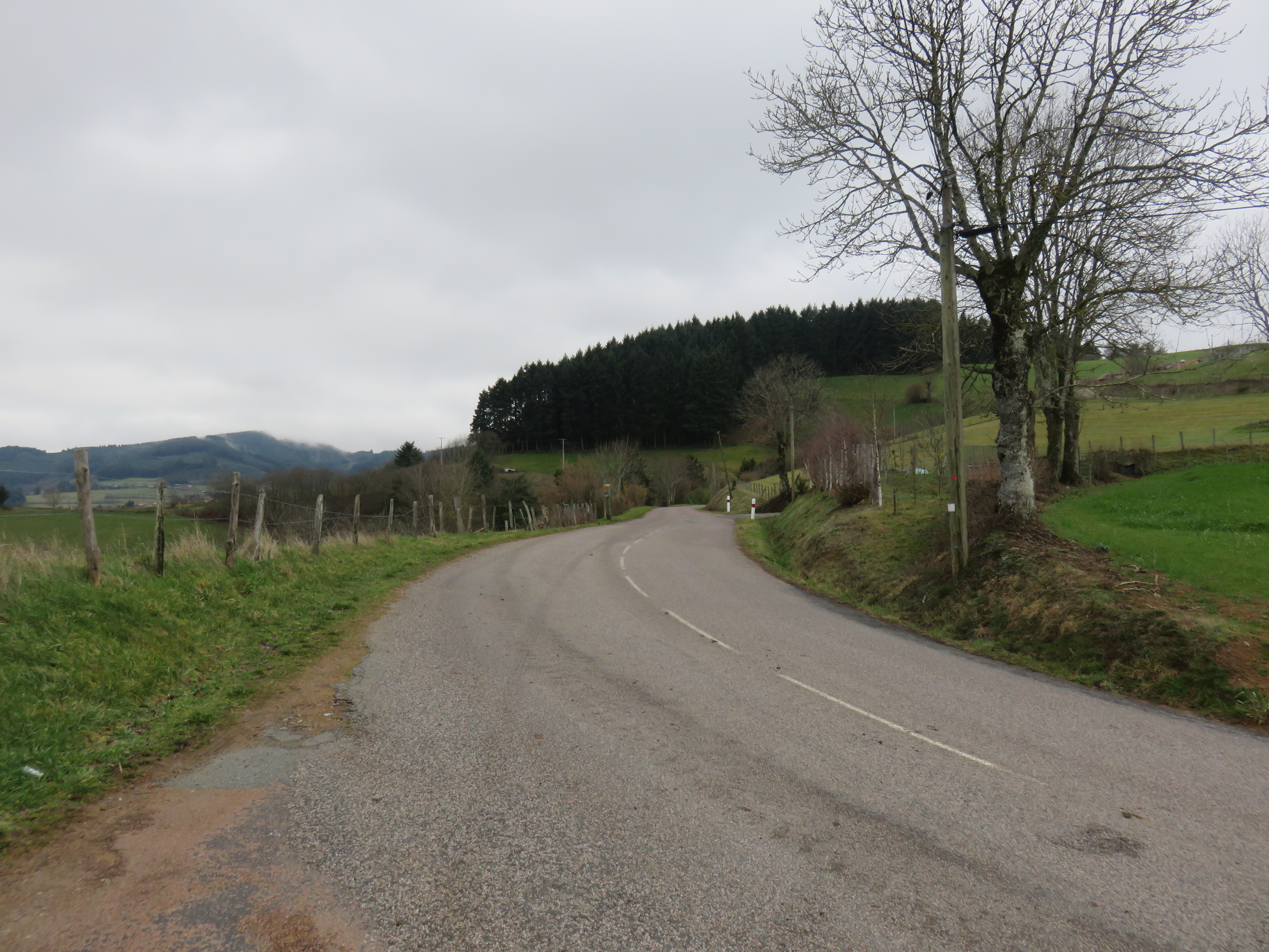 Vue de la route départementale 54 en direction de Saint-Just-d'Avray, au niveau du lieu-dit du Chirat, à Grandris (Rhône, France).